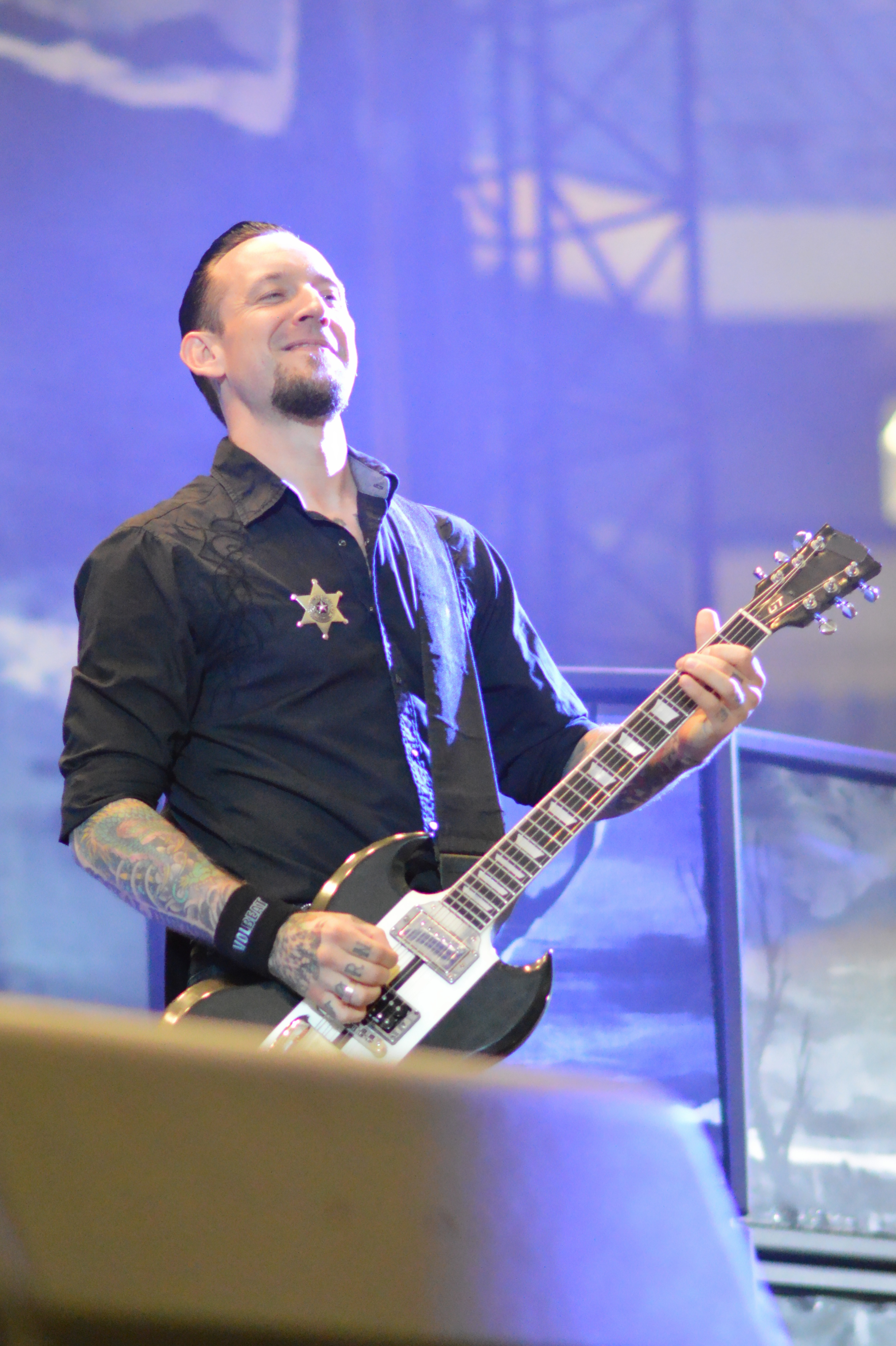 Volbeat bei Rock im Pott 2013